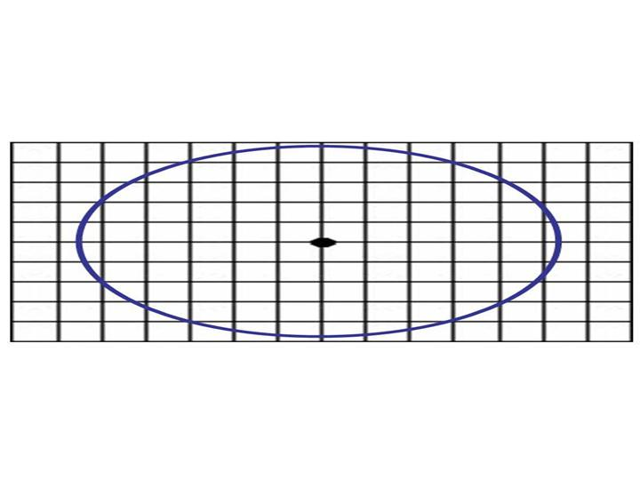 Longitud de onda